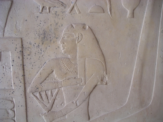 Relief représentant une des filles de Kagemni, vizir du pharaon Téti - Mastaba de Kagemni - Saqqarah - Ve dynastie à VIe dynastie égyptienne